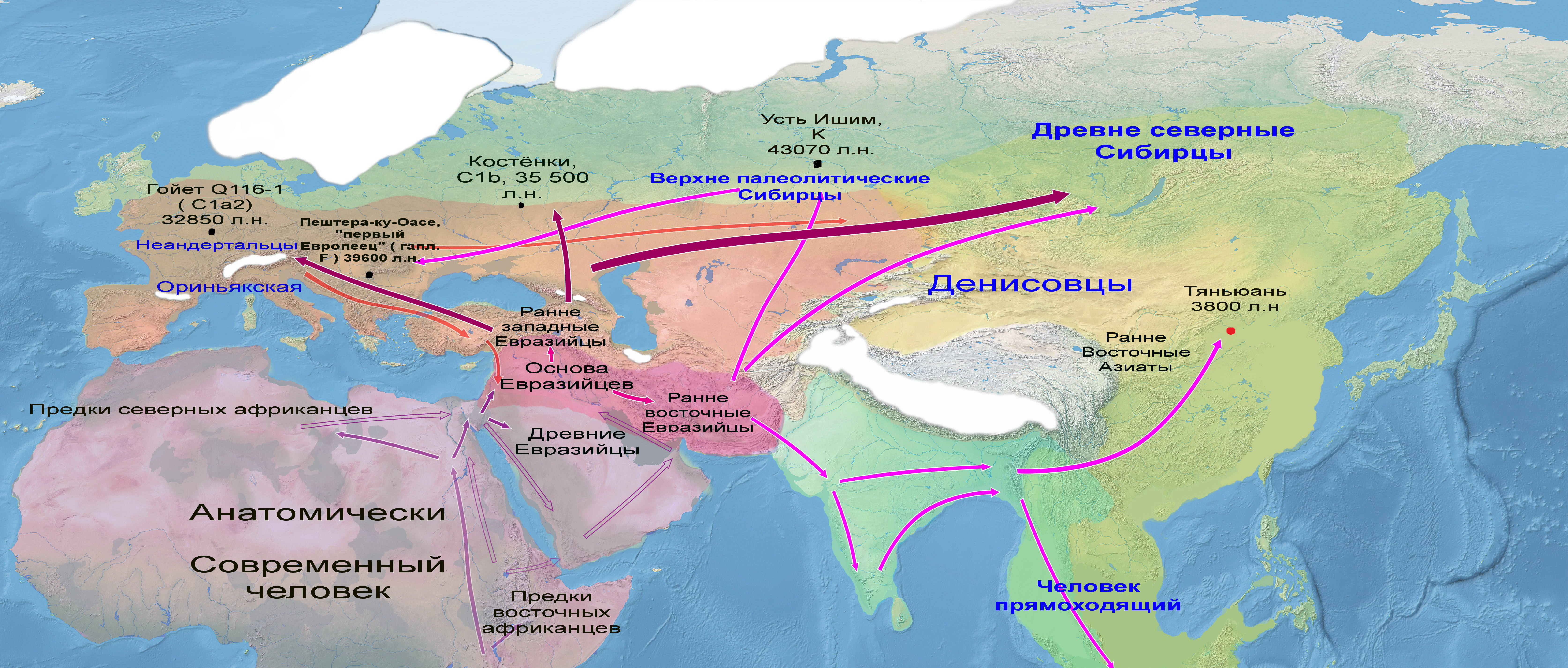 Переведённая версия иностранной карты под свободной лицензией 3.0 Автор карты разрешил переводить и редактировать её, в целях улучшения и развития её точности и распространения.